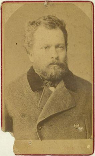 Namık Kemal’in 1878’de dönemin meşhur fotoğraf stüdyosu Abdullah Biraderler’de çektirdiği fotoğraf.